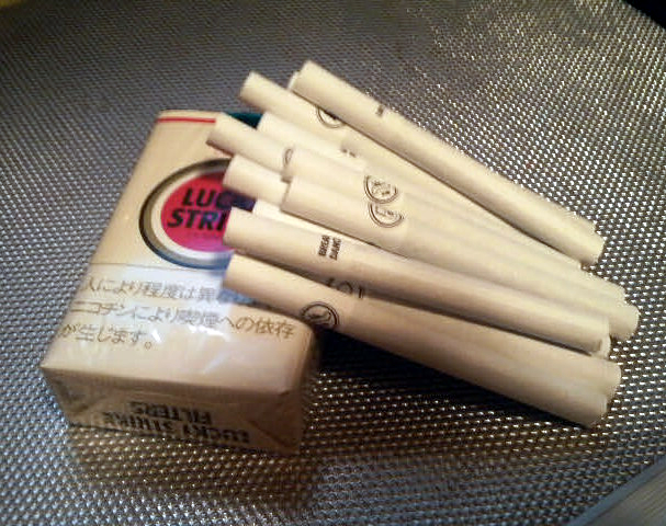 Lucky Strike White Design Filters